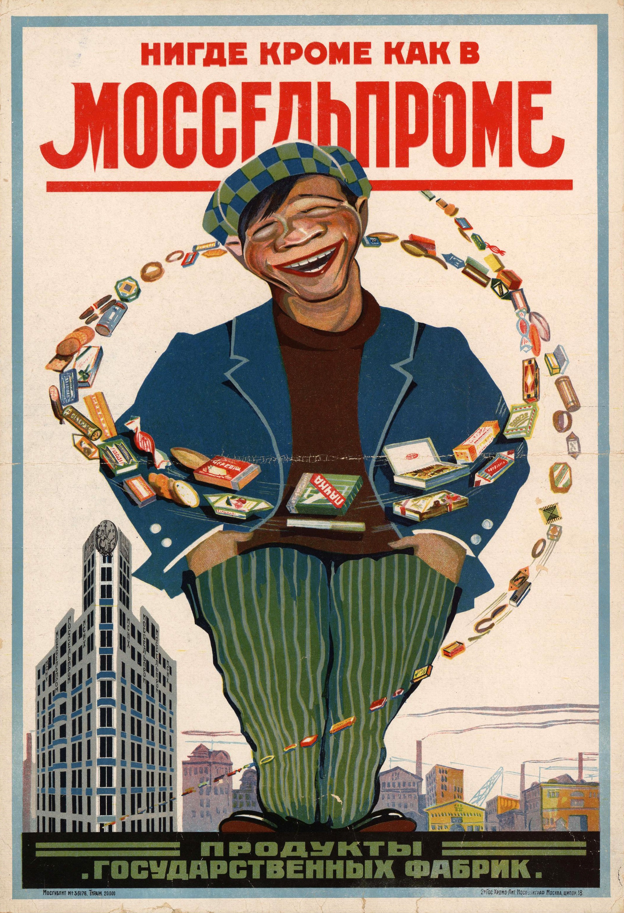 Рекламный плакат «Моссельпрома». Москва, [1927]. Хромолитография, 53×36 см. Тираж 20 000 єкз.